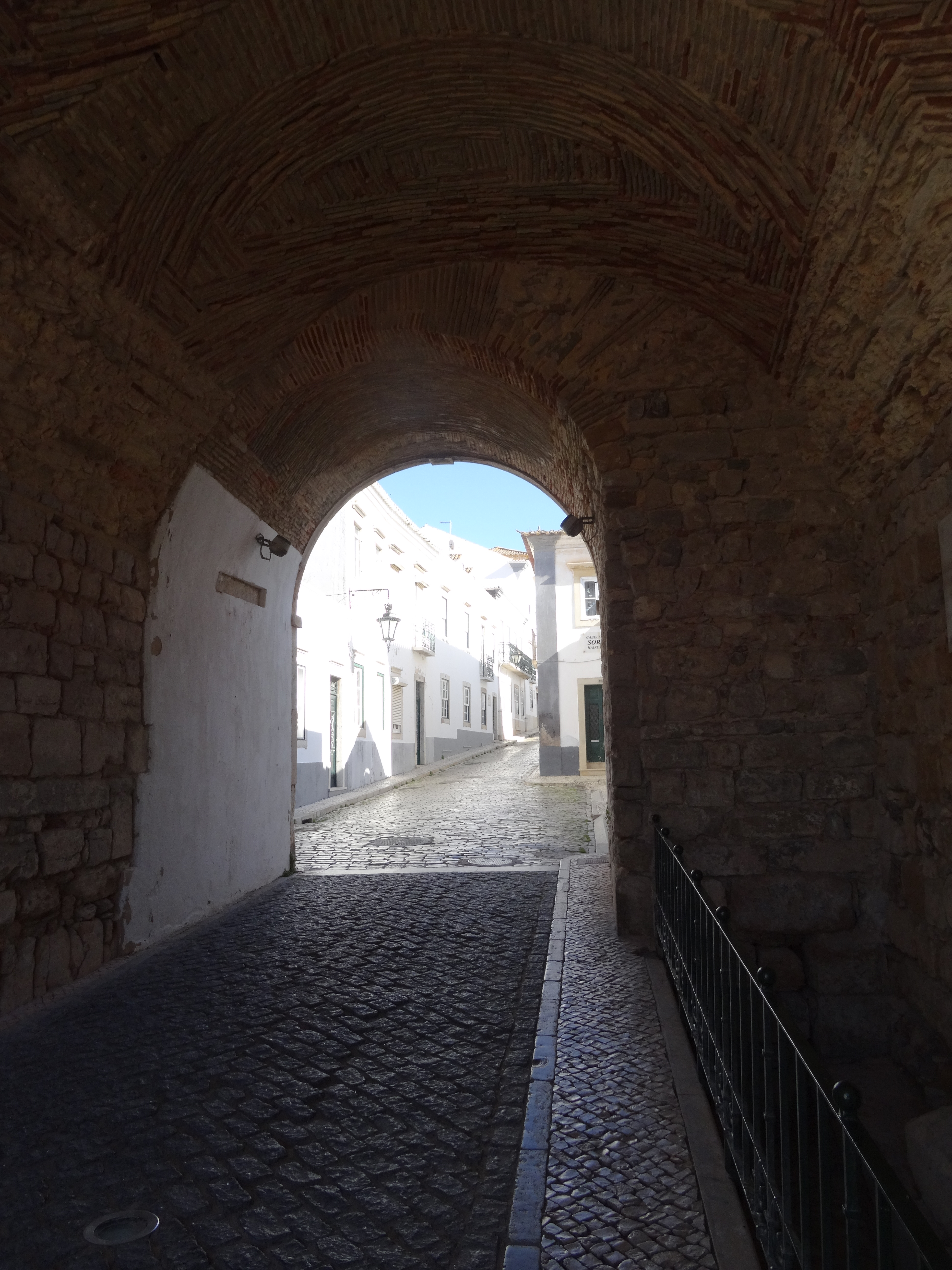 Arco da Vila, Faro, Portugao